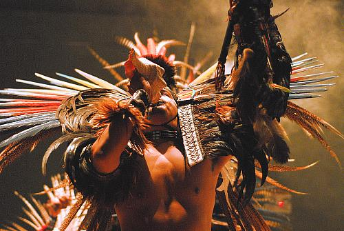 ნაჰუას შამანი